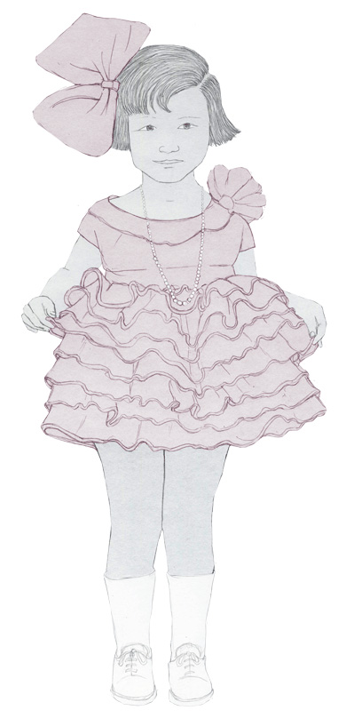 Imatges del Museu Valencià d'Etnologia (Andrés Marín Jarque) per al Museu Comarcal de l'Horta Sud